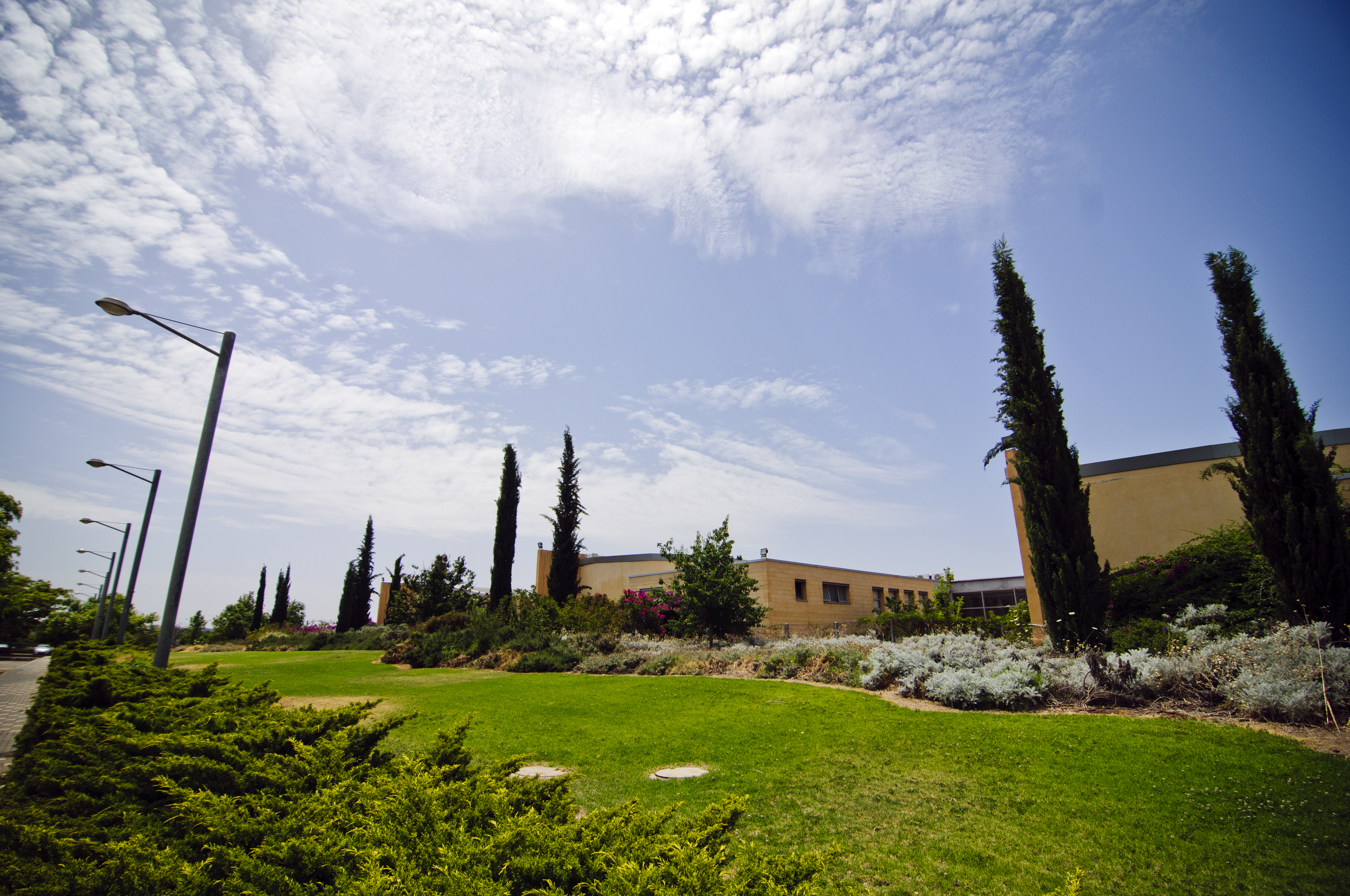 Ohalo College of Education